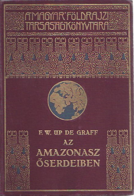 A Magyar Földrajzi társaság sorozat könyvborítója